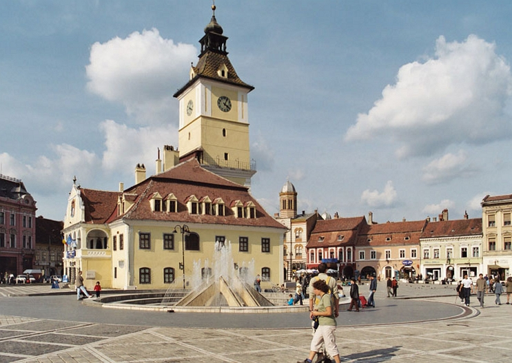 Marktplatz in Kronstadt, fotografiert im September 2003